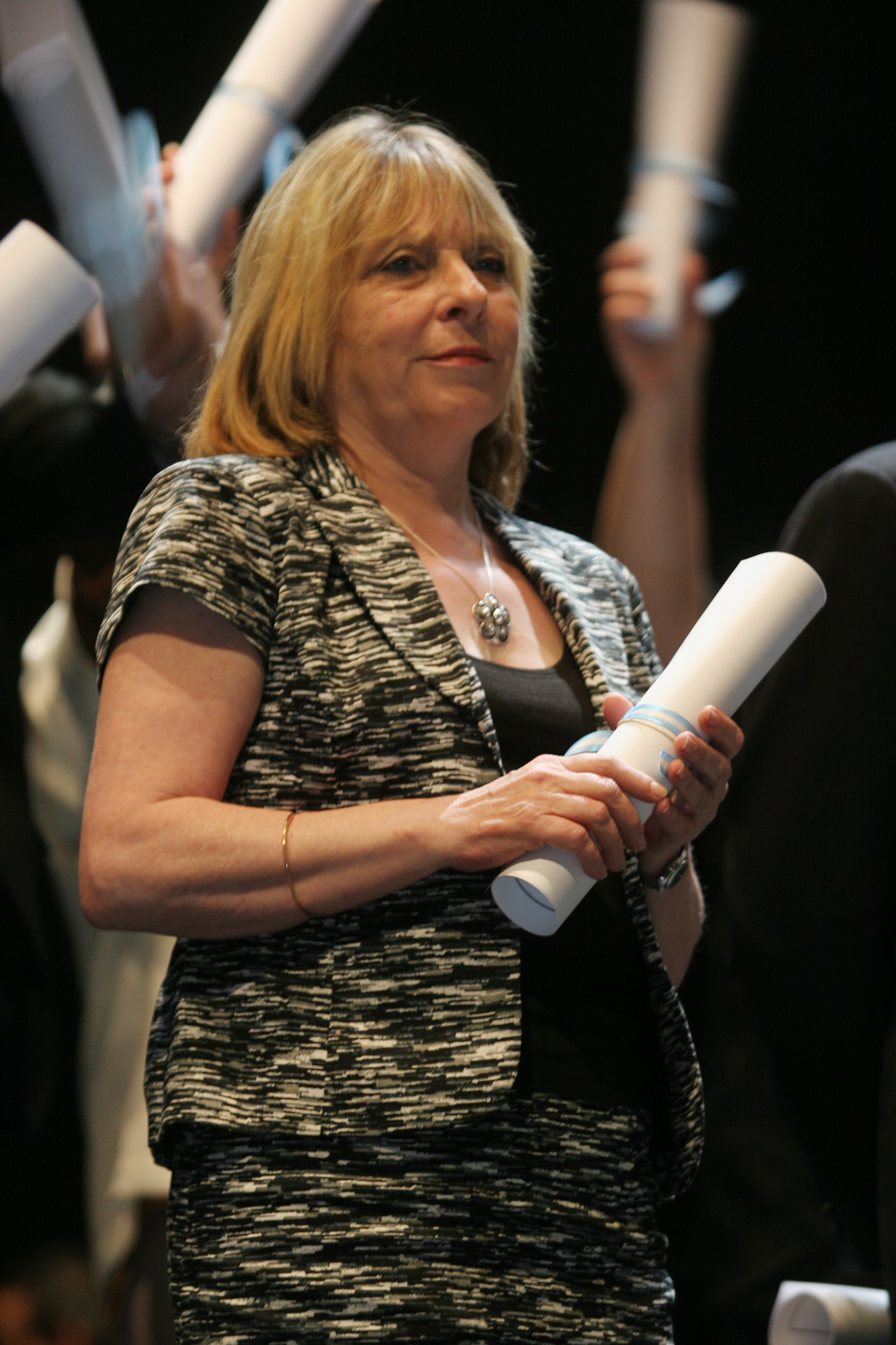 Virginia González Gass, Legisladora de la Ciudad de Buenos Aires